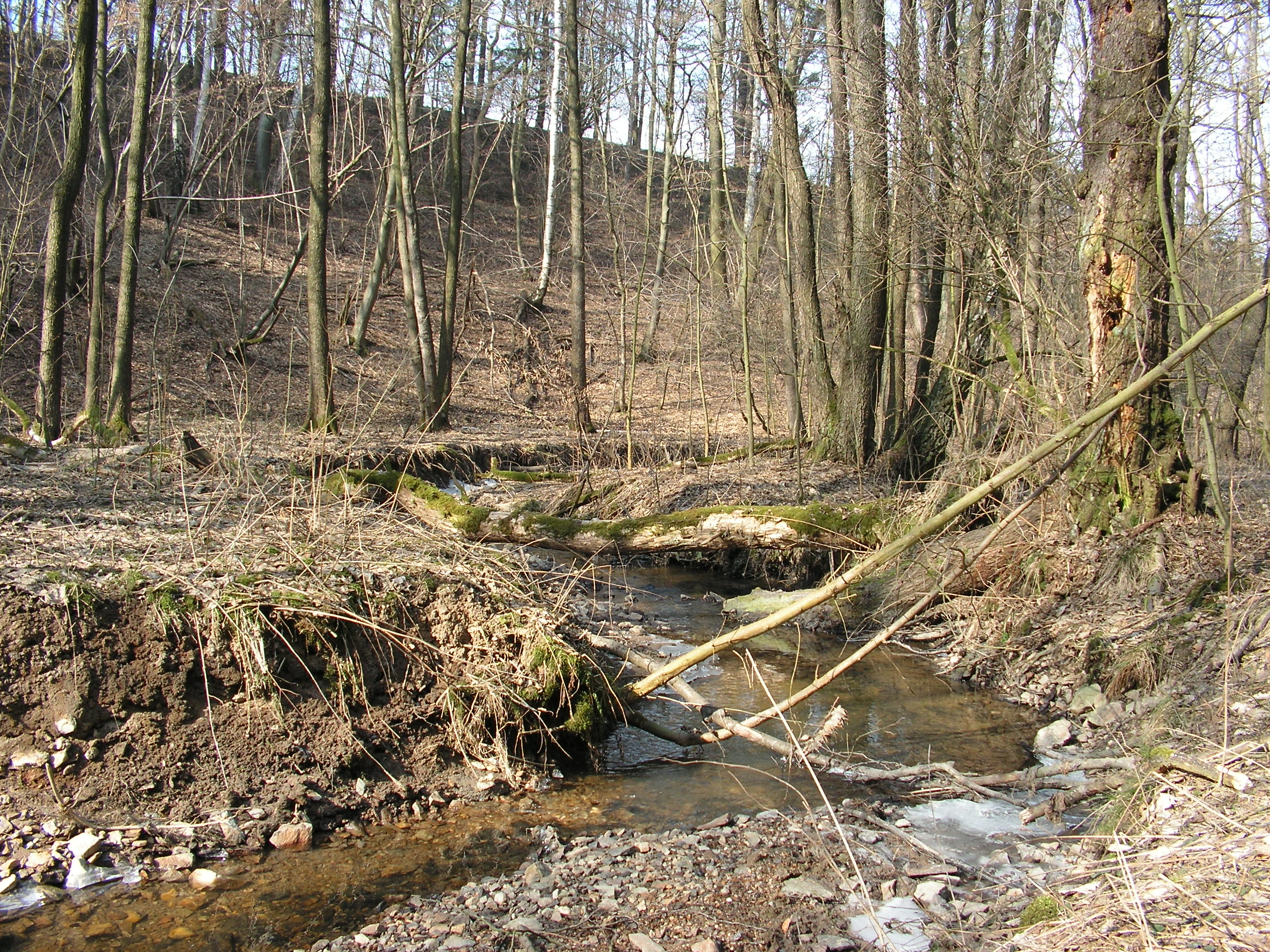 Chlumský potok pod vsí Chlum, která se nachází v okrese Kutná Hora. Foceno zhruba na jeho 2,0 říčním kilometru.